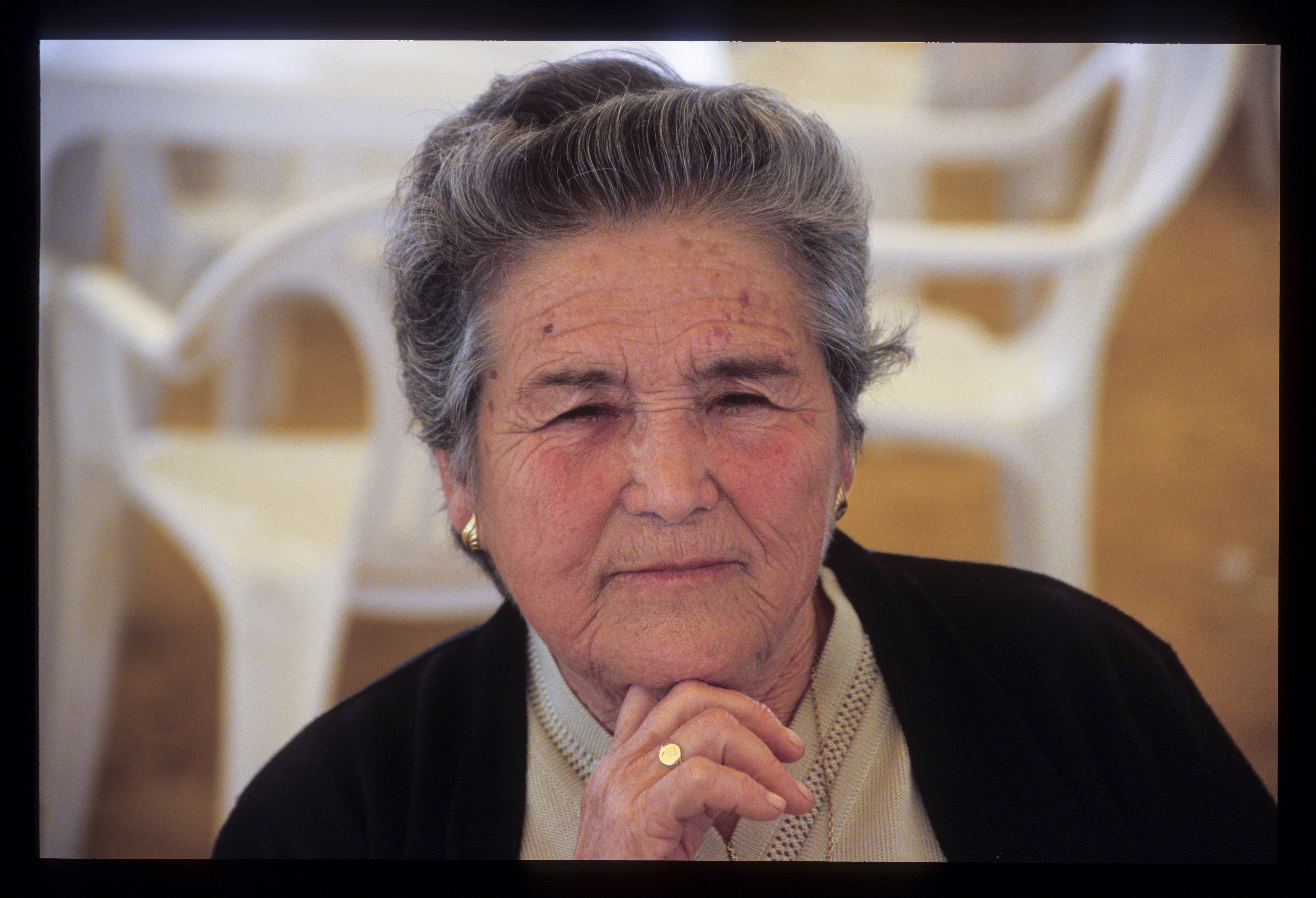 Francisca Adame Hens a los 91 años